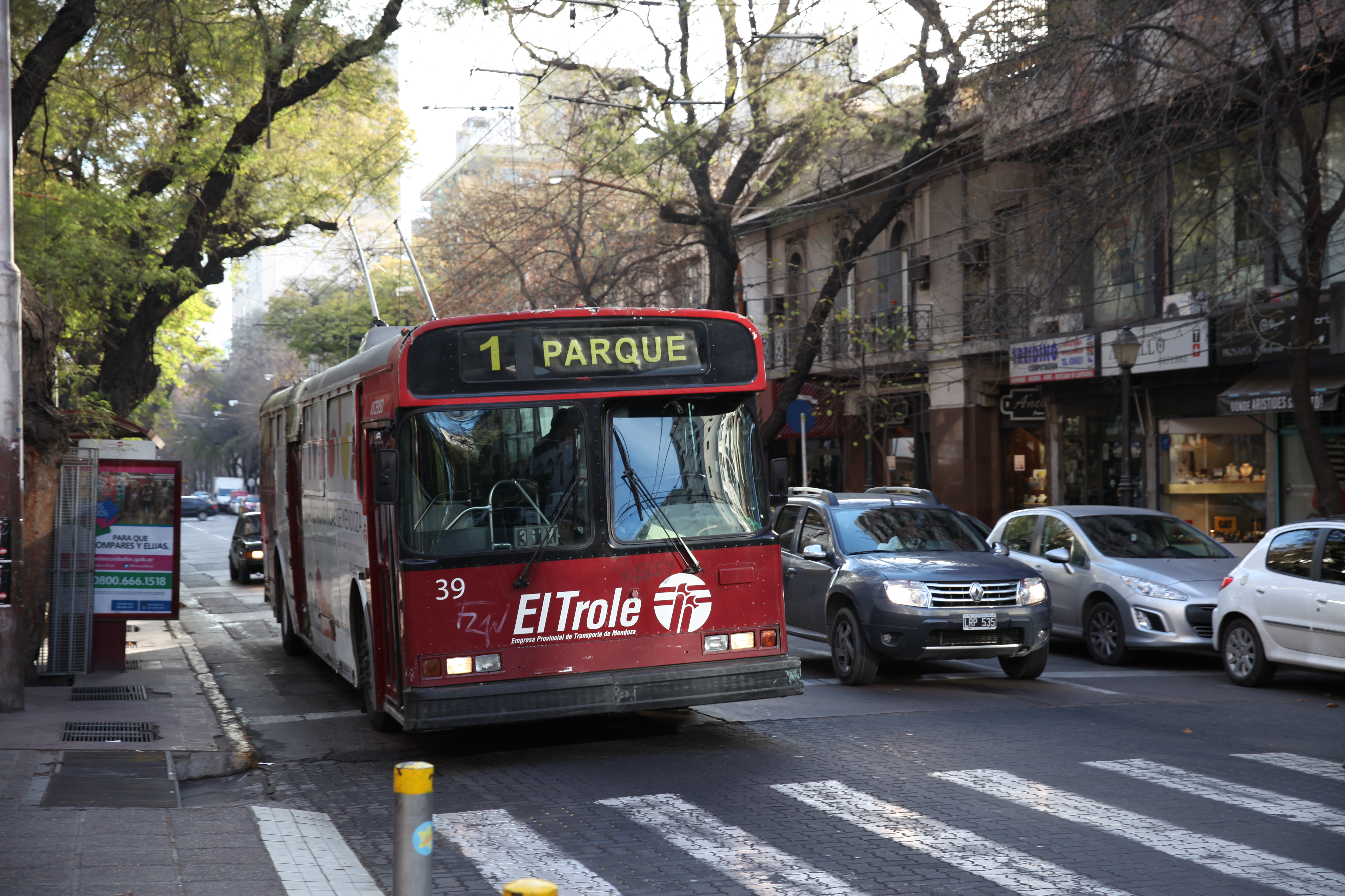 el trole buss